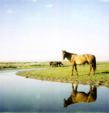 Balikun, Xinjiang